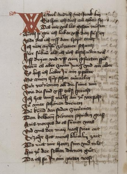 Erste Seite von Hermann von Sachsenheims „Von der Grasmetzen“